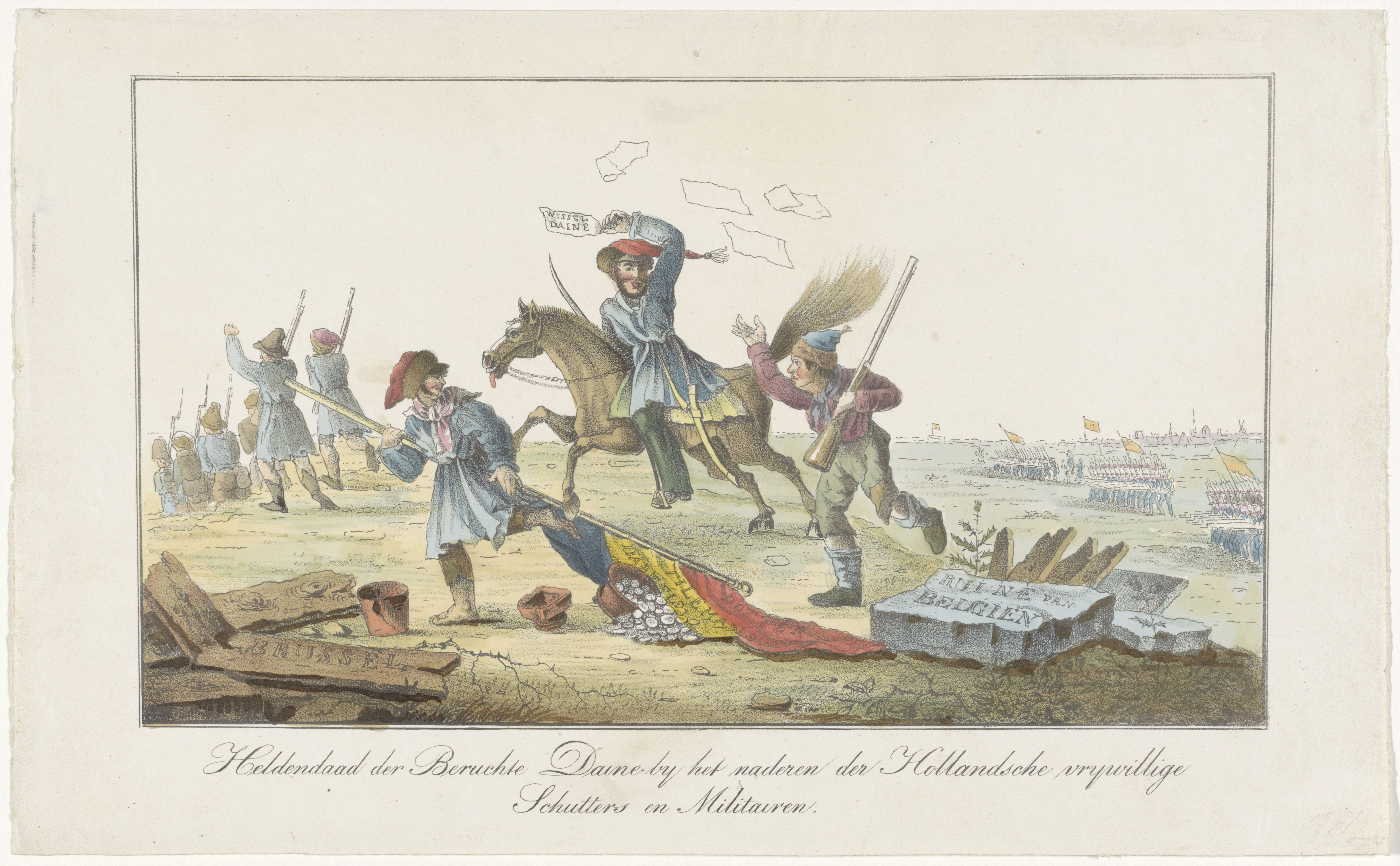 IdentificatieTitel(s): Daine op de vlucht, 1831Heldendaad der Beruchte Daine bij het naderen der Hollandsche vrijwillige Schutters en Militairen (titel op object)Objecttype: prent spotprent Objectnummer: RP-P-OB-88.431Catalogusreferentie: FMH 6729Atlas van Stolk 7059Opschriften / Merken: verzamelaarsmerk, verso, gestempeld: Lugt 2228Omschrijving: Spotprent op de vlucht van de Belgische generaal Daine, na zijn verlies in de slag bij Hasselt op 8 augustus 1831. Generaal Daine in blauwe kiel slaat met zijn manschappen op de vlucht en strooit onderweg met valse wissels, een militair sleept de Belgische vlag over de grond bij een aardewerken pot met geldstukken.VervaardigingVervaardiger: prentmaker: anoniemPlaats vervaardiging: NederlandDatering: 1831Fysieke kenmerken: lithografie, met de hand gekleurdMateriaal: papier Techniek: lithografie (techniek) / met de hand kleurenAfmetingen: blad: h 240 mm × b 391 mmOnderwerpWat: retreat of the defeatedputting the enemy to flight - HH - being put to flight, fleeingSlag bij HasseltWanneer: 1831-08-08 - 1831-08-08Waar: HasseltWie: Nicolas Joseph DaineVerwerving en rechtenVerwerving: aankoop 1881Copyright: Publiek domein